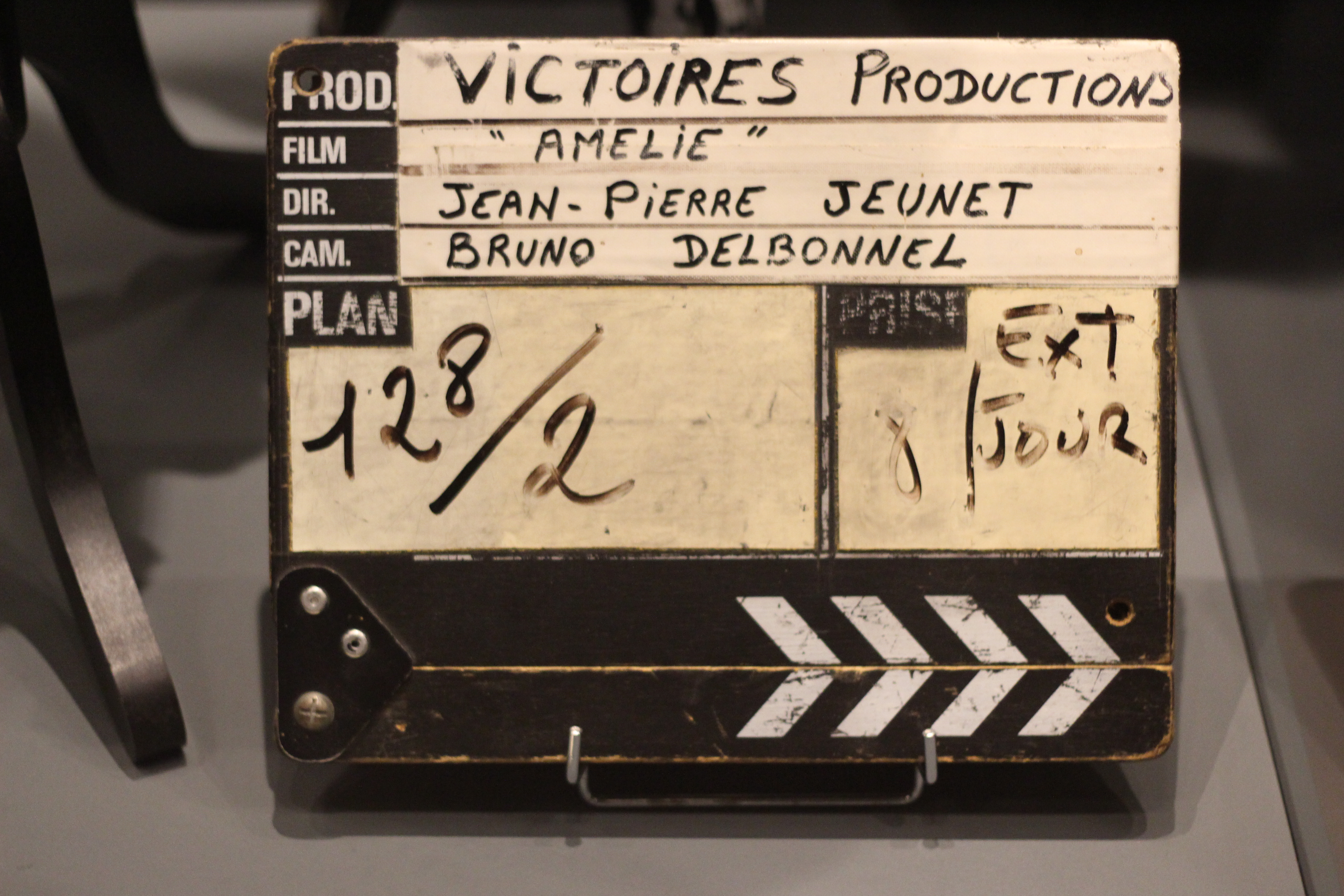 Clap du film Le Fabuleux Destin d'Amélie Poulain. Exposition "Caro/Jeunet" au musée Minature et Cinéma en 2018-2019.